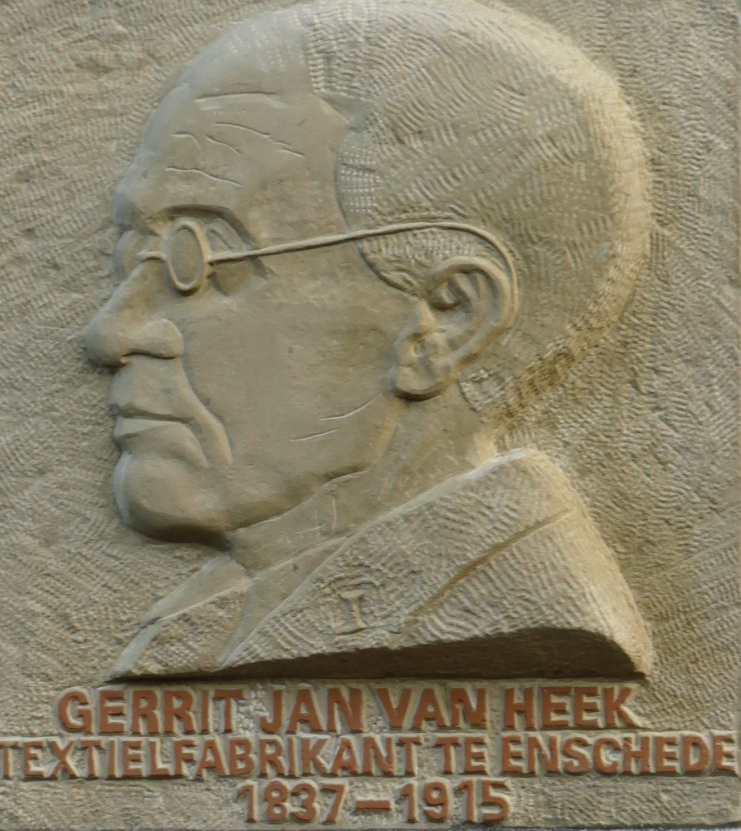 Gedenksteen Gerrit Jan van Heek, in 2015 geplaatst aan de gevel van zijn voormalig woonhuis, Oude Markt 26 te Enschede, ter gelegenheid van zijn honderdste sterfdag